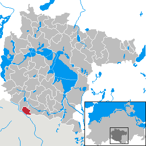 Grabow-Below in Mecklenburg-Western Pomerania - District Müritz